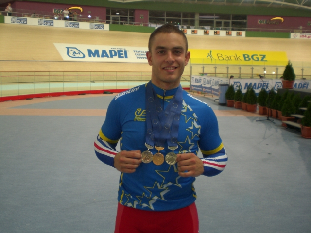 Michaël D'Almeida - Championnat d'europe 2008 en Pologne. 1 médaille d'or sur le Kilomètre 2 médailles d'argent en Vitesse et au Keirin